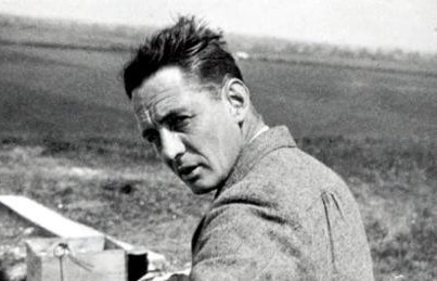 Alexander Keiller (archaeologist)